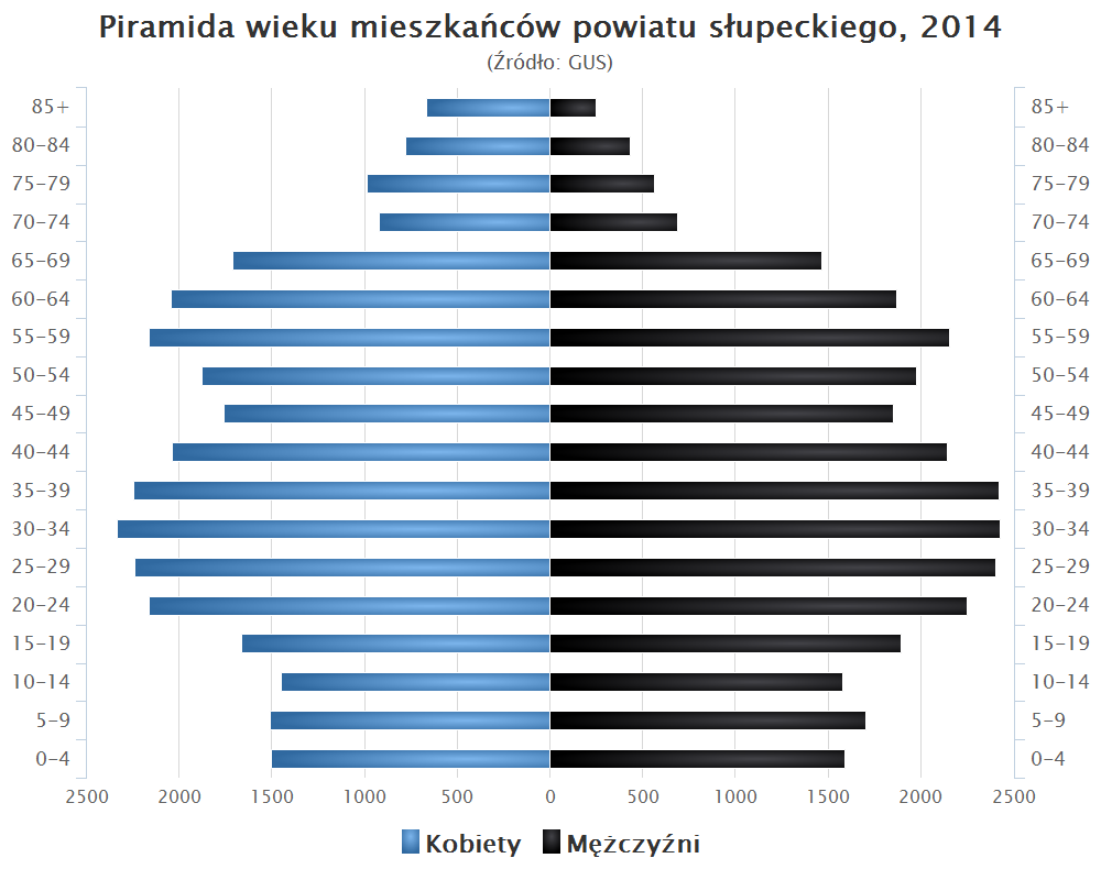 Piramida wieku mieszkańców powiatu słupeckiego, 2014